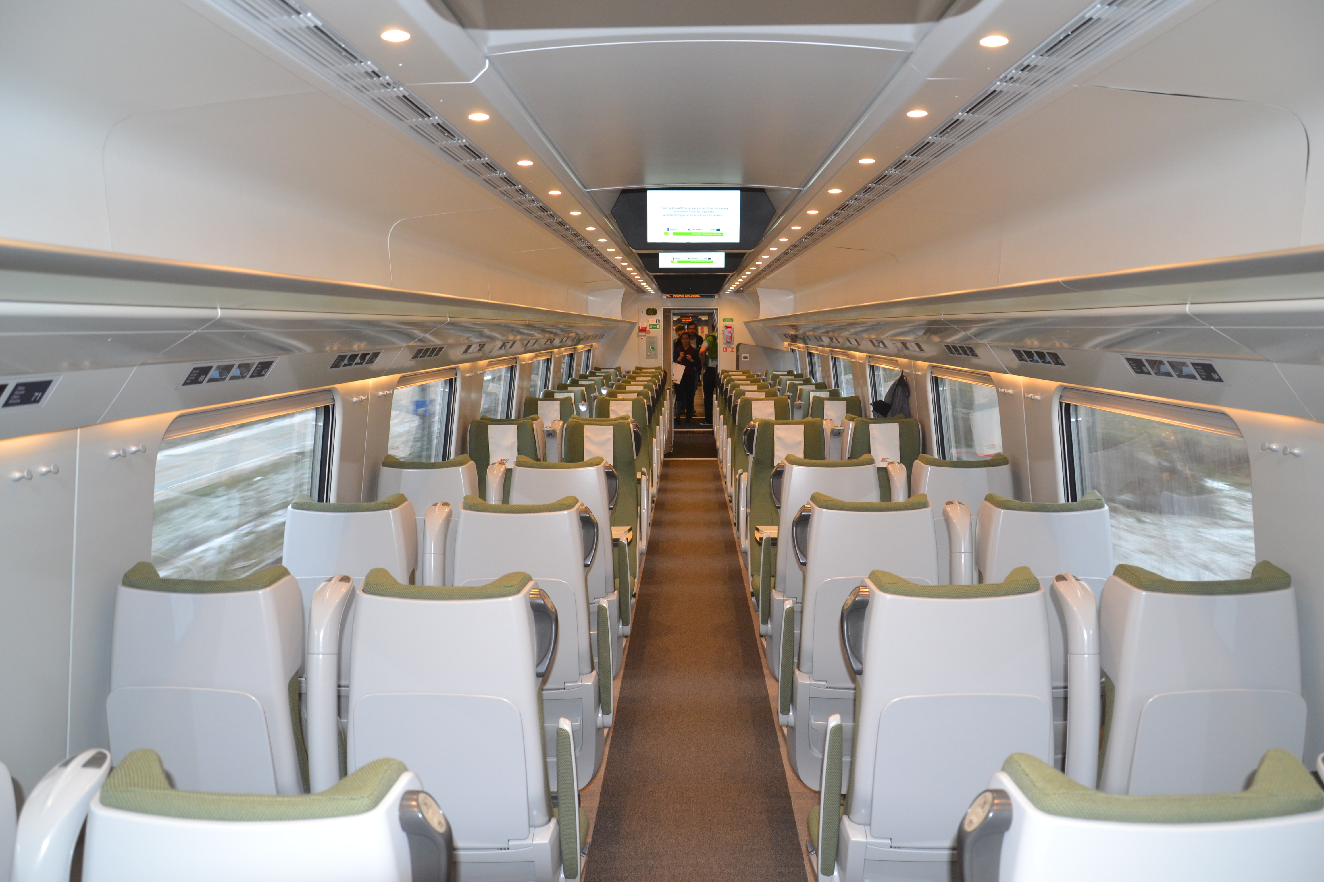 Jeden z siedmiu członów ED250-007 wnętrze, 2 klasa